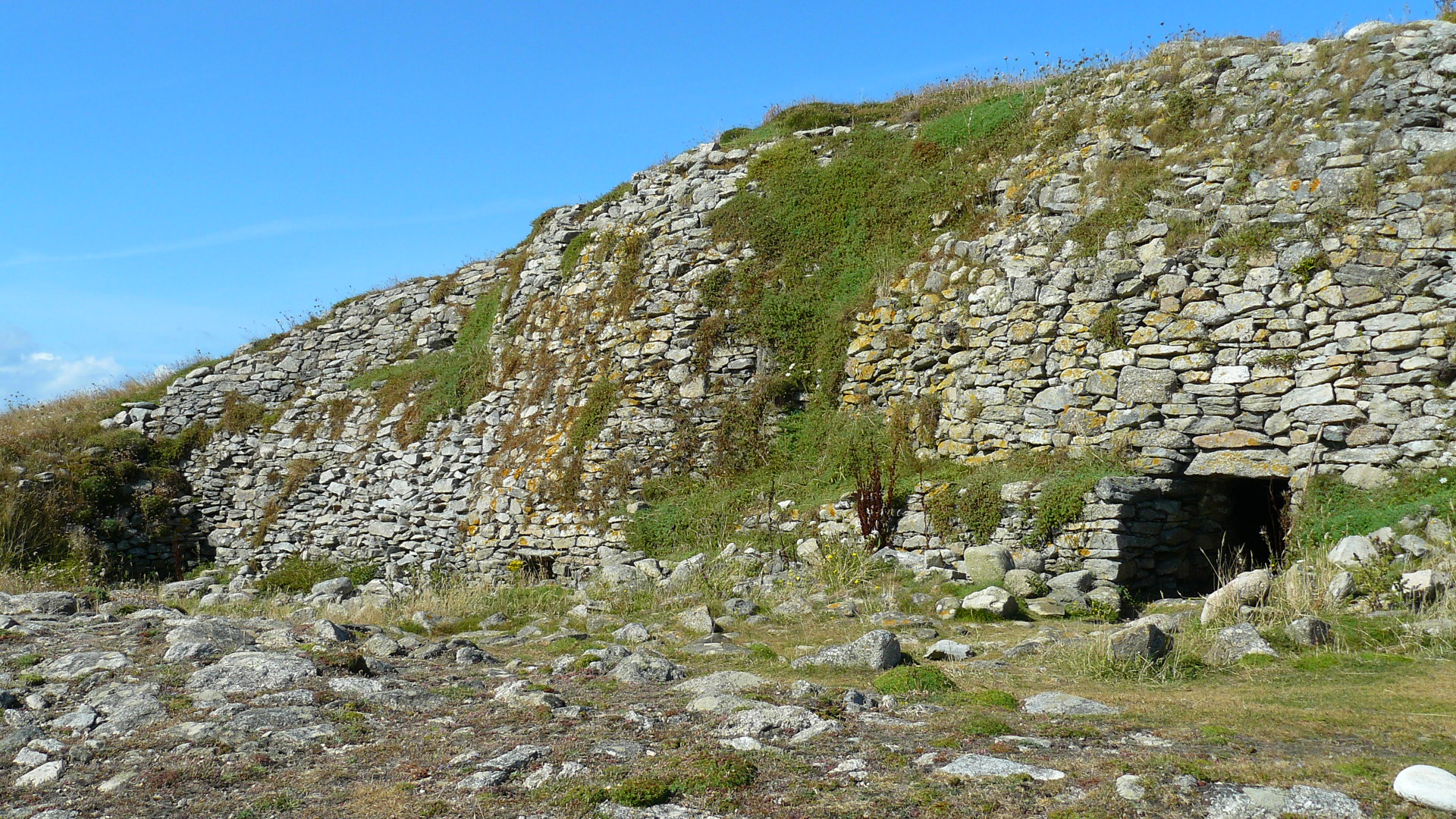 Façade du cairn primaire de l'île Carn, sur la commune de Ploudalmézeau, dans le Bas-Léon, en Finistère, en Bretagne. Vue prise du nord. De droite à gauche : l'entrée du dolmen nord, celle du dolmen central et l'on devine celle du dolmen sud, juste avant la zone détruite pendant la Seconde Guerre mondiale pour construire une casemate allemande.